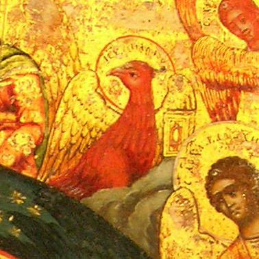 Ікона з Веткаўскага музея